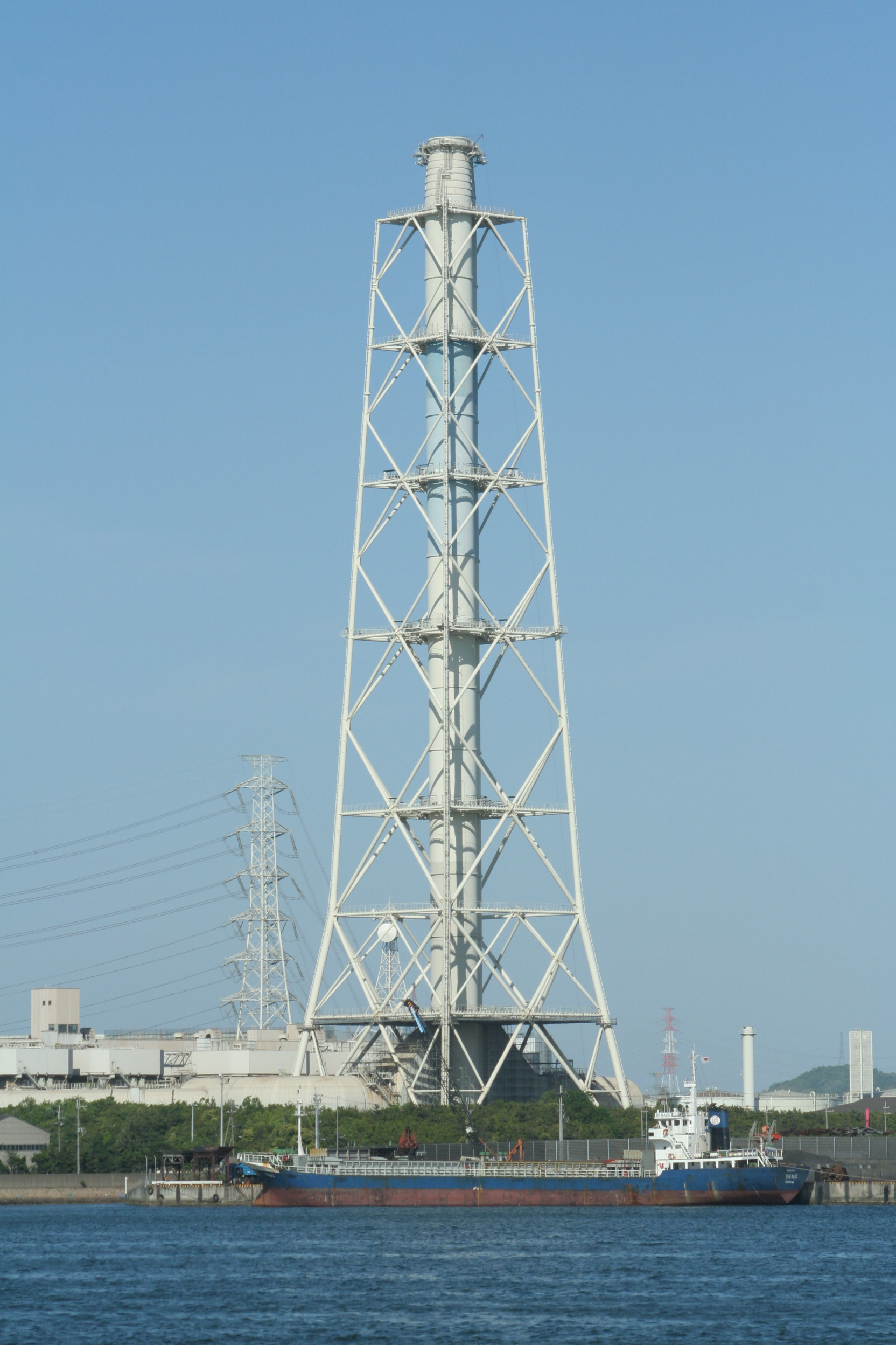 姫路市中島地区にある煙突。